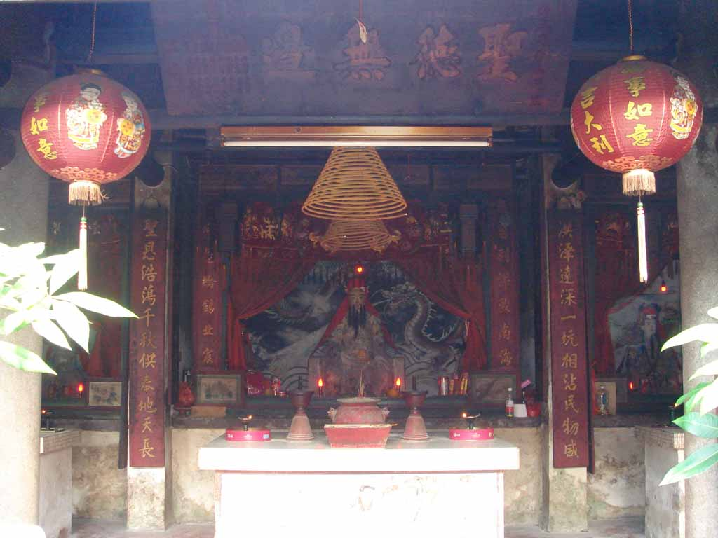 中文（香港）: 洪聖宮正廳（洪聖）。